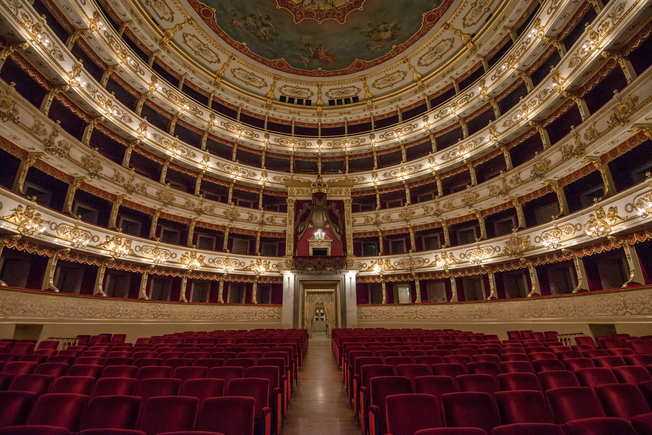 Teatro Regio This is a photo of a monument which is part of cultural heritage of Italy.